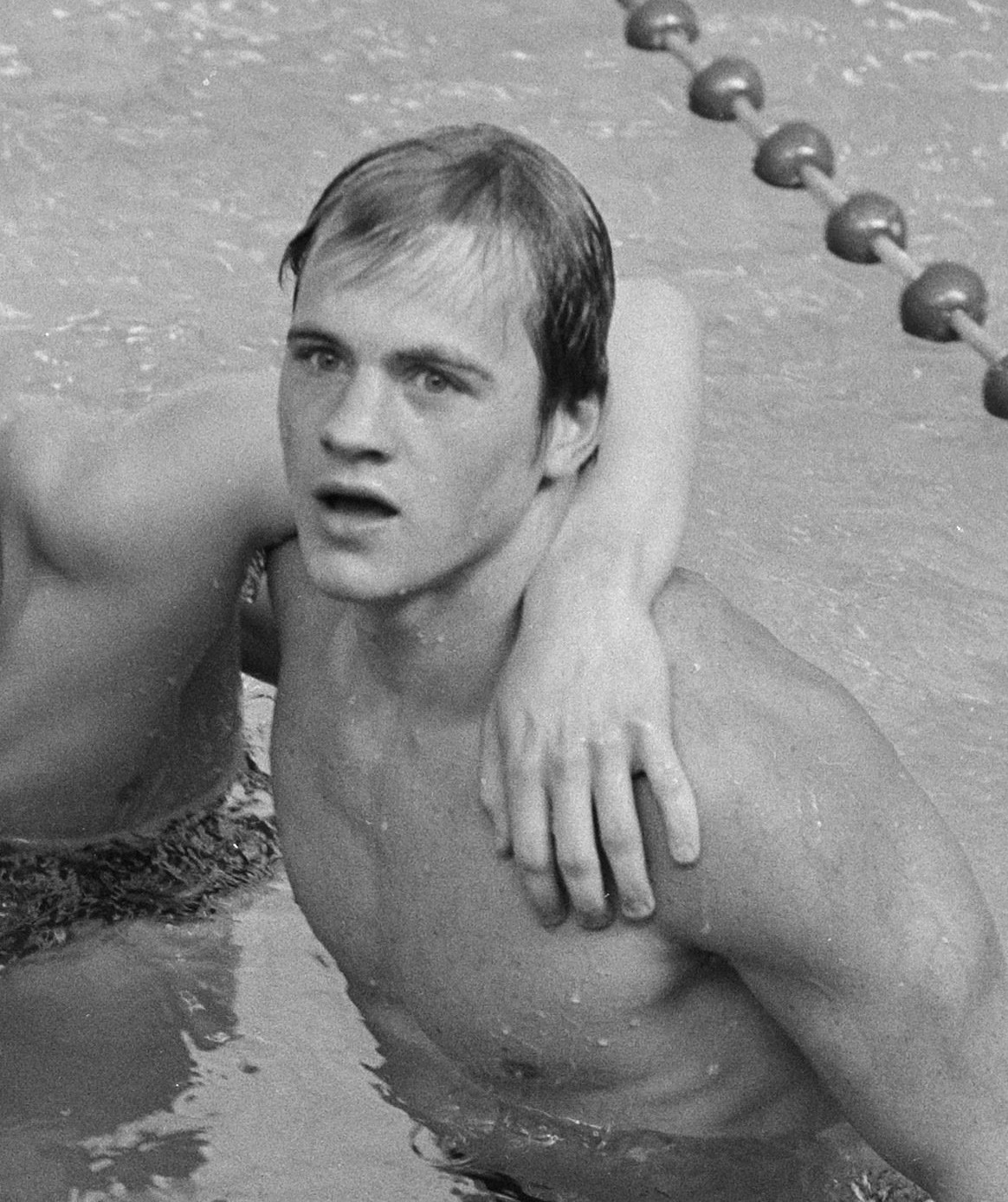 Eurovisie-zeslandenzwemtoernooi te Bussum, Zweedse zwemmers